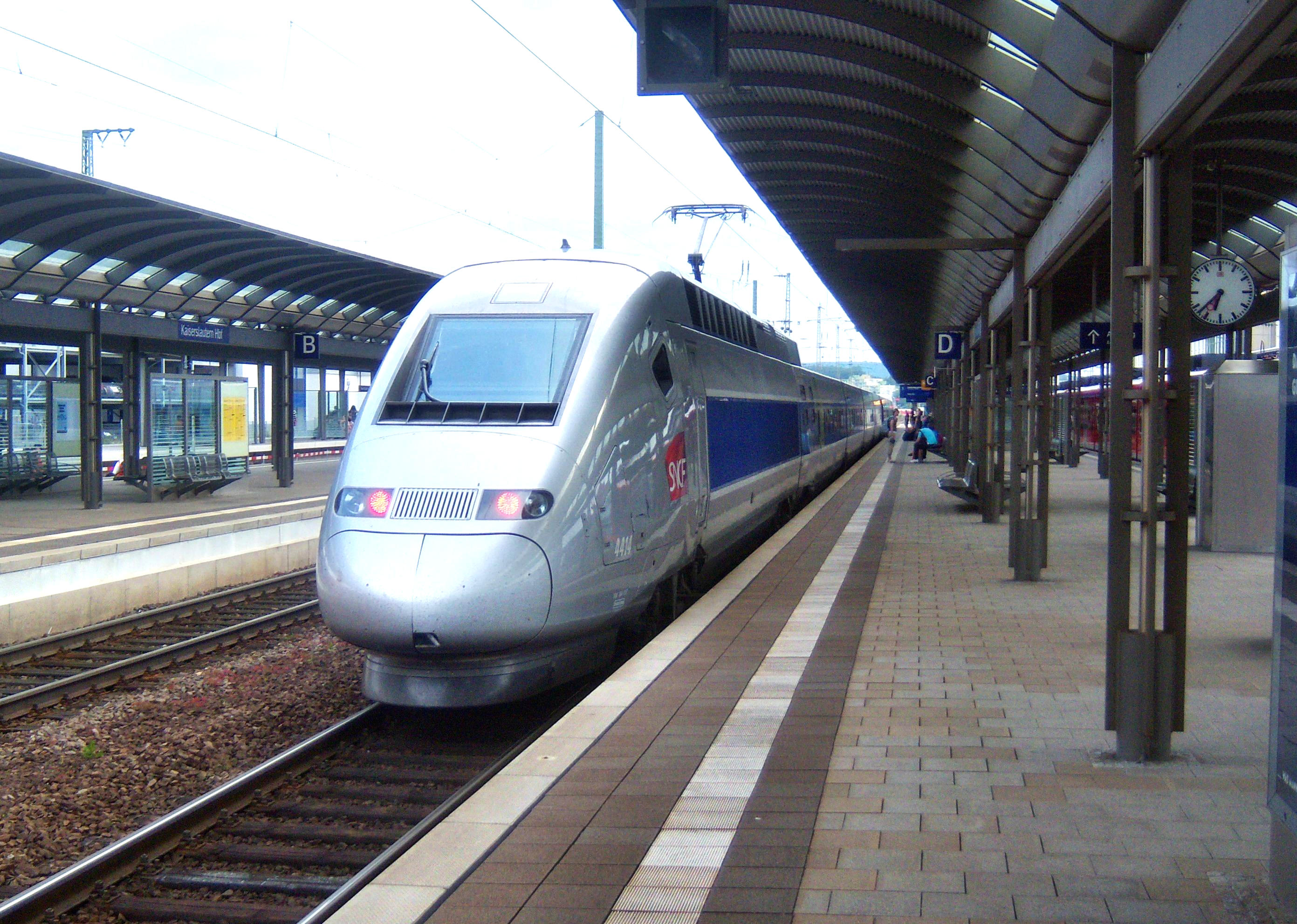 TGV auf dem Weg nach Paris im Kaiserslauterner Hauptbahnhof